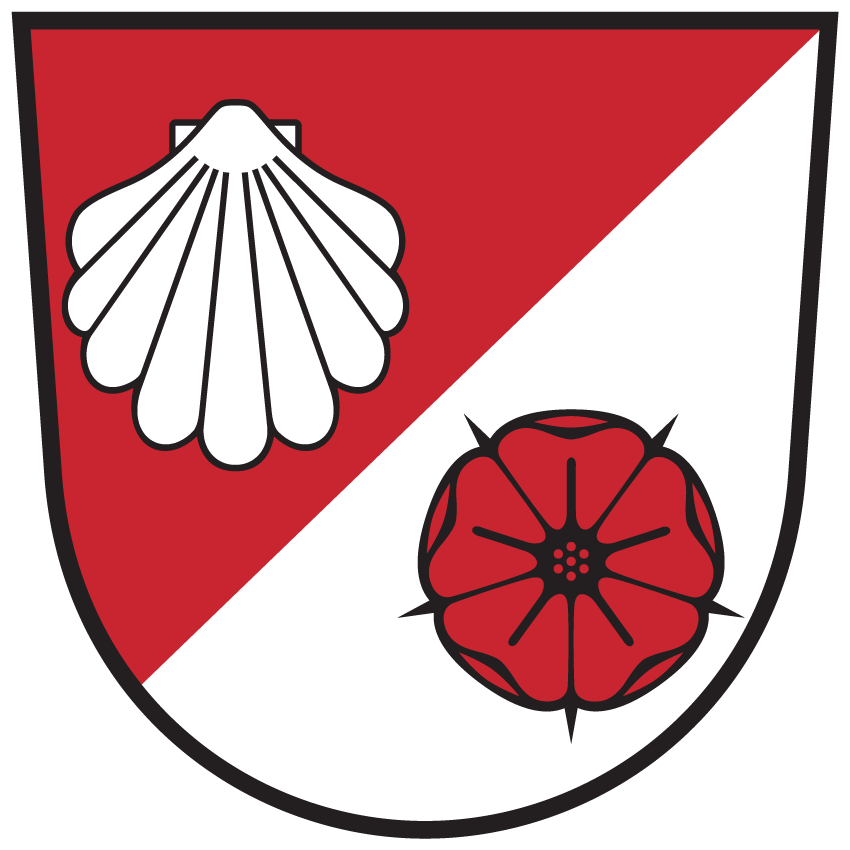 Wappen von St. Jakob im Rosental